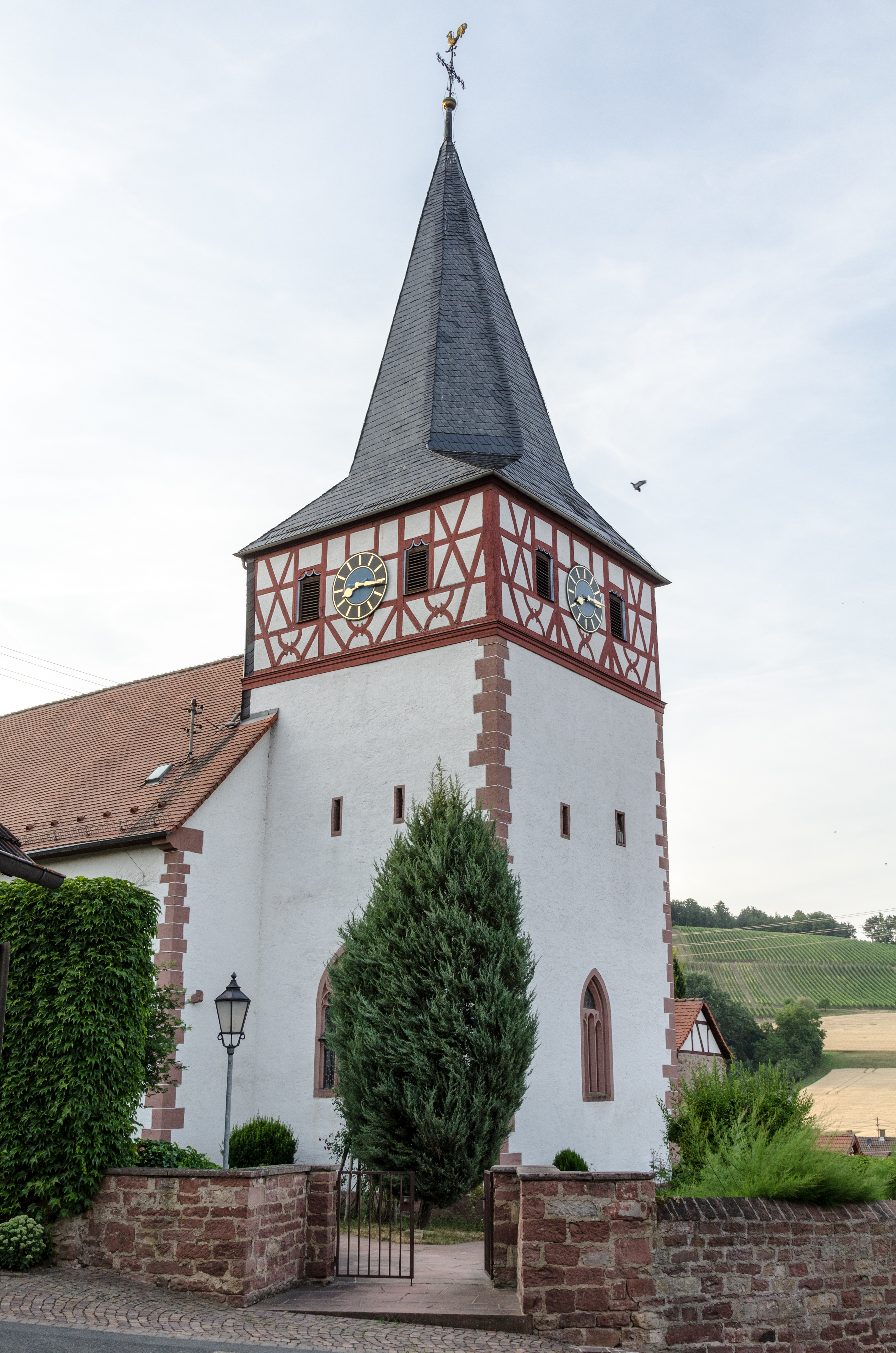 Wertheim. Dertingen, Kirche